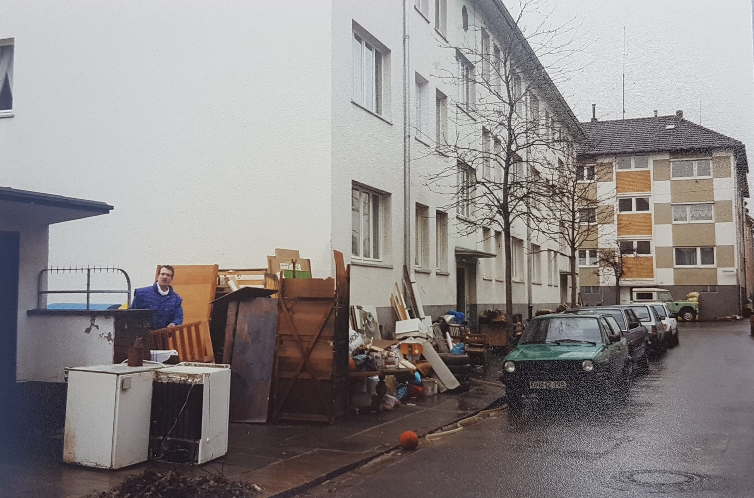 Hochwasserschäden durch das Rheinhochwasser im Dezember 1993. Anwohner stellten die durch das Hochwasser beschädigten und zerstörten Gegenstände aus den Kellern für den Sperrmüll auf die Straße.